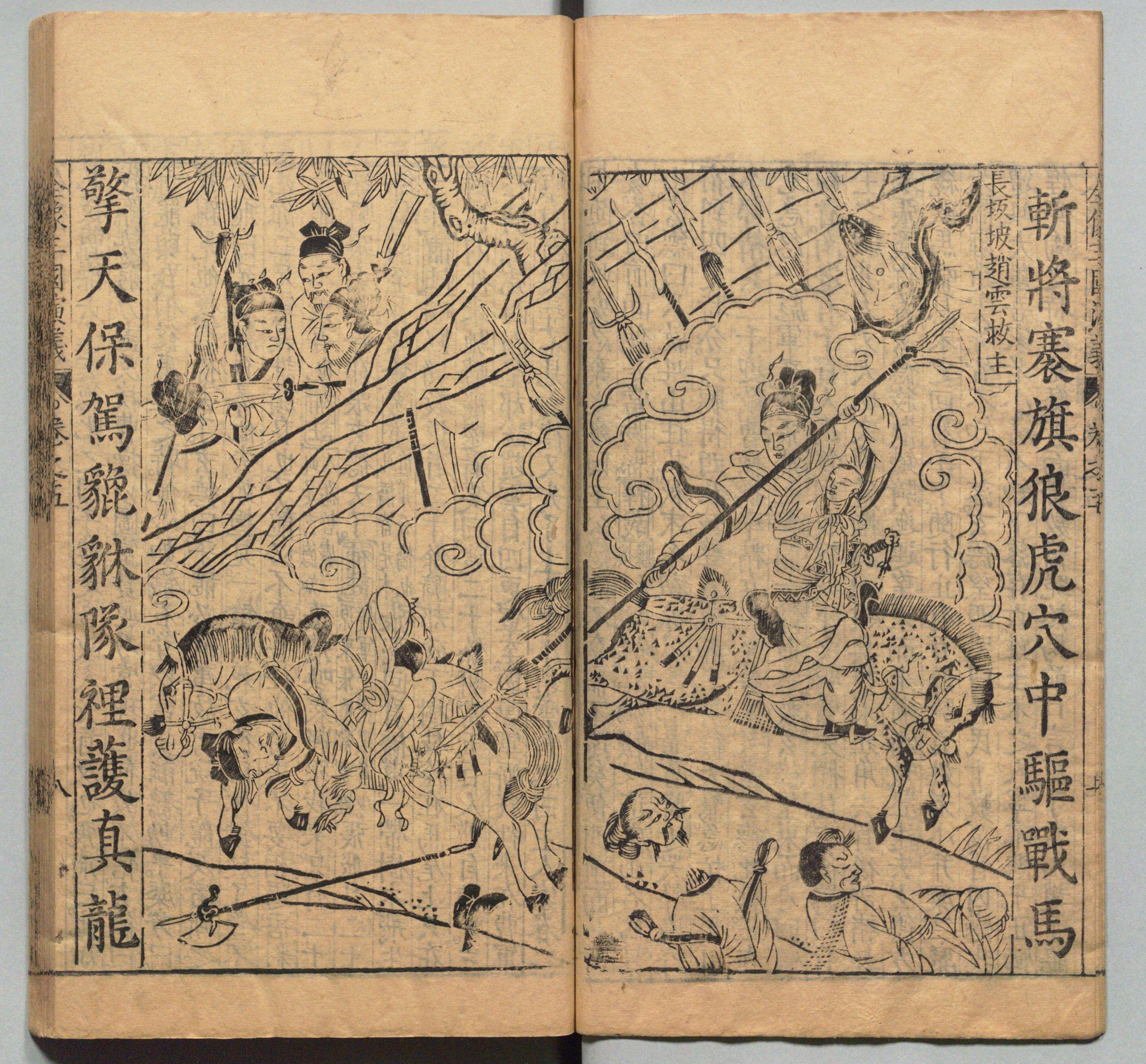 新刊校正古本大字音释三国志通俗演义 明万历十九年书林周曰校刊本